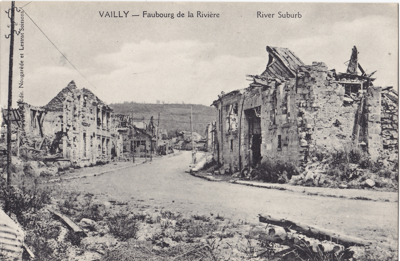 Carte postale ancienne éditée par Nougarède & Lestrat à Soissons : VAILLY - Faubourg de la Rivière